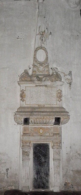 Tombeau de Claude d'Espinay en la collégiale Sainte-Marie-Madeleine de Champeaux (35).